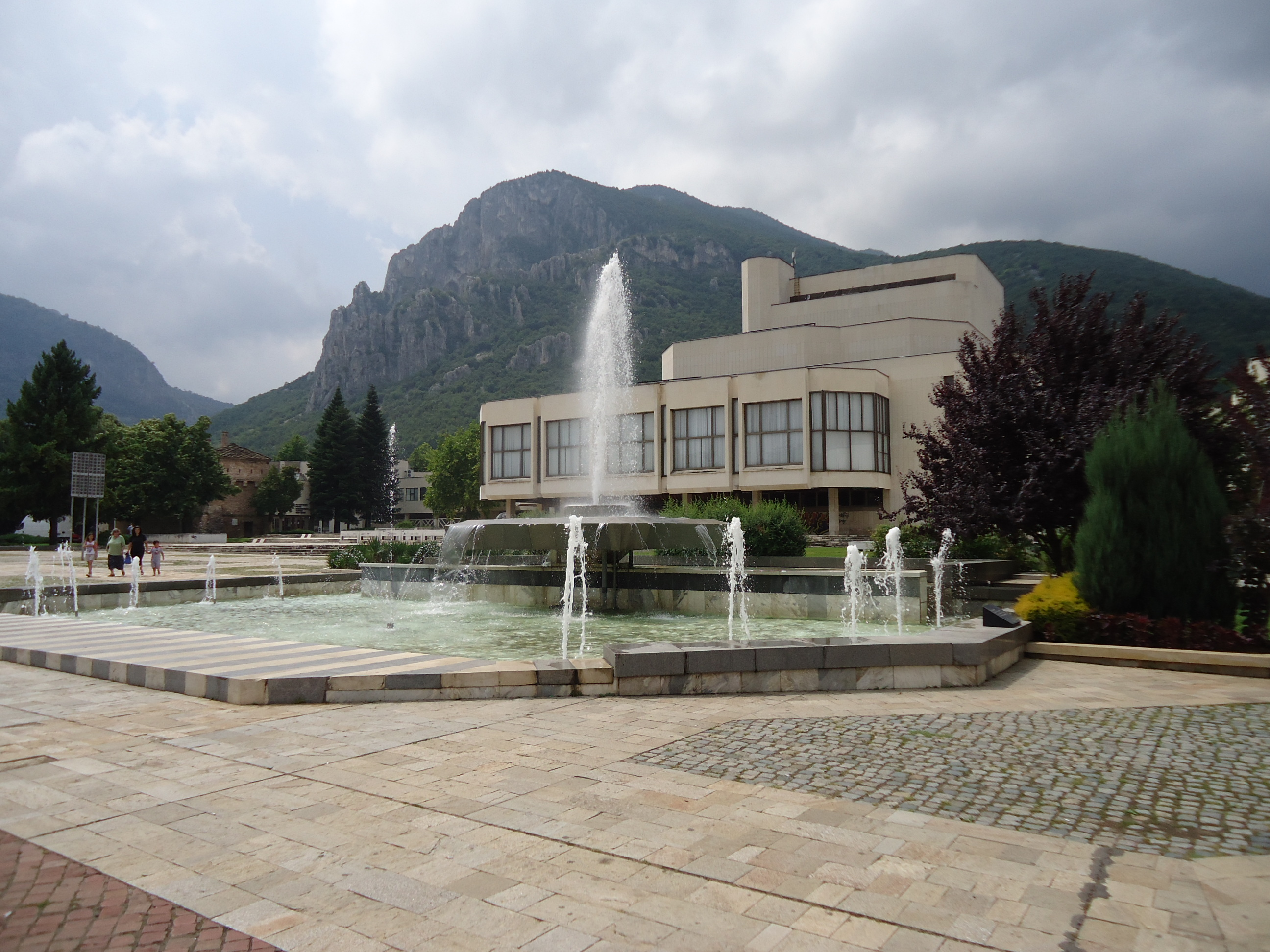 Драматично-куклен театър - Враца